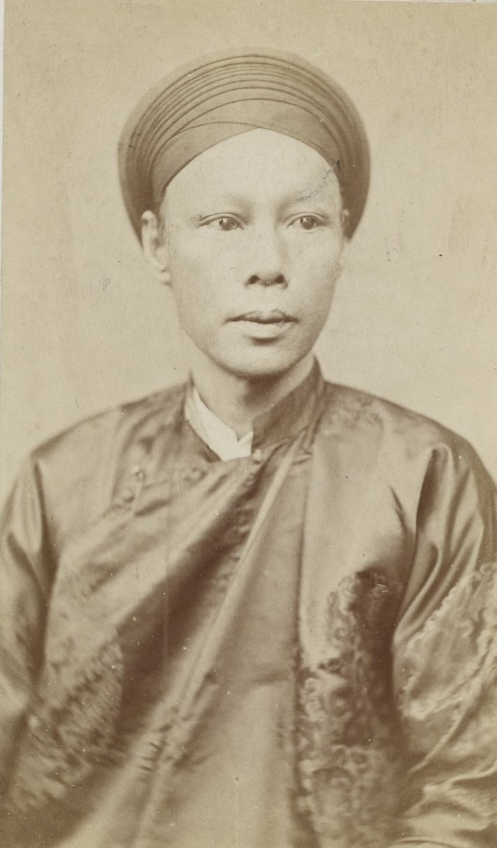 Chân dung Pétrus Trương Vĩnh Ký chụp ngày 6 tháng 7 năm 1883